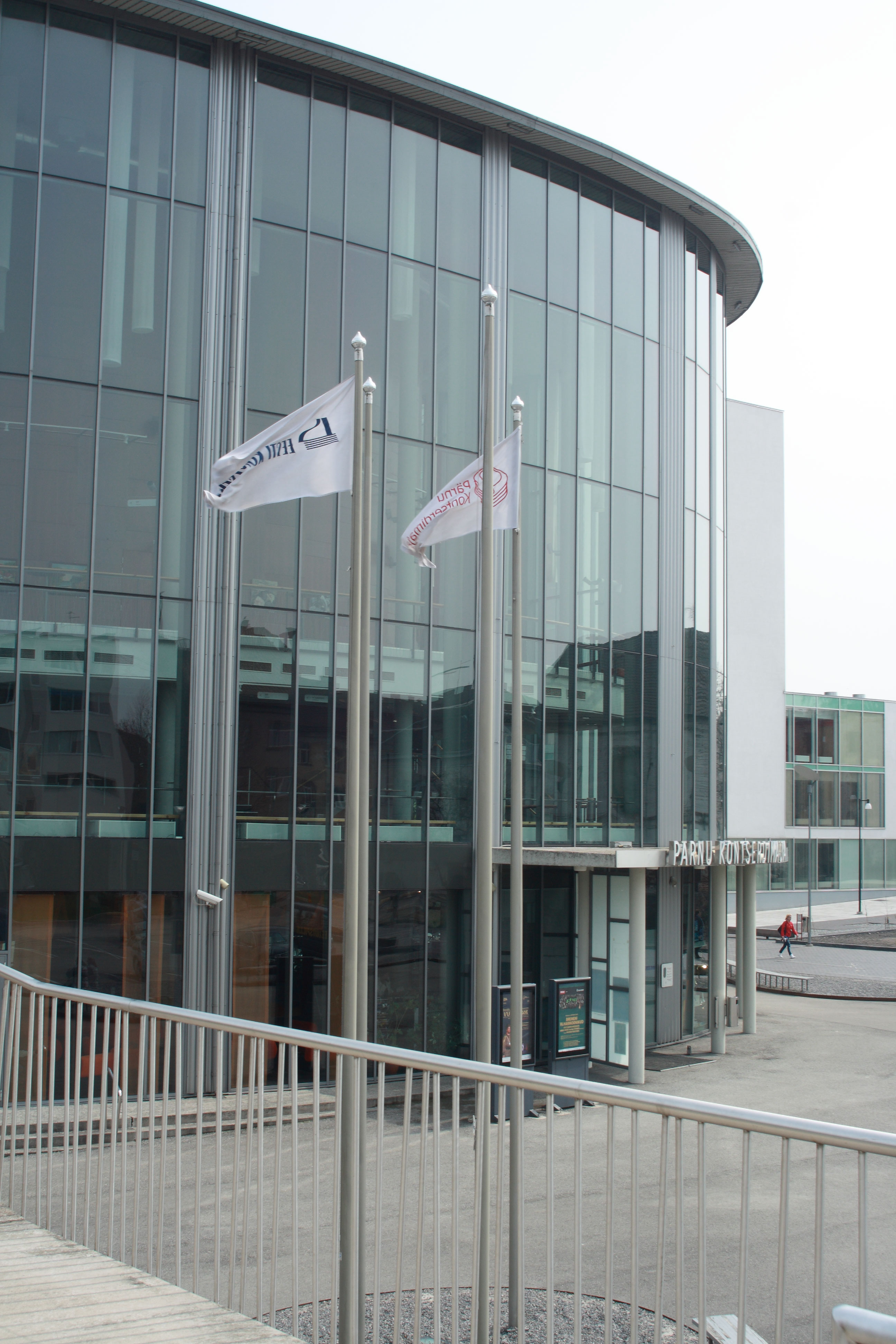 Pärnu kontserdimaja